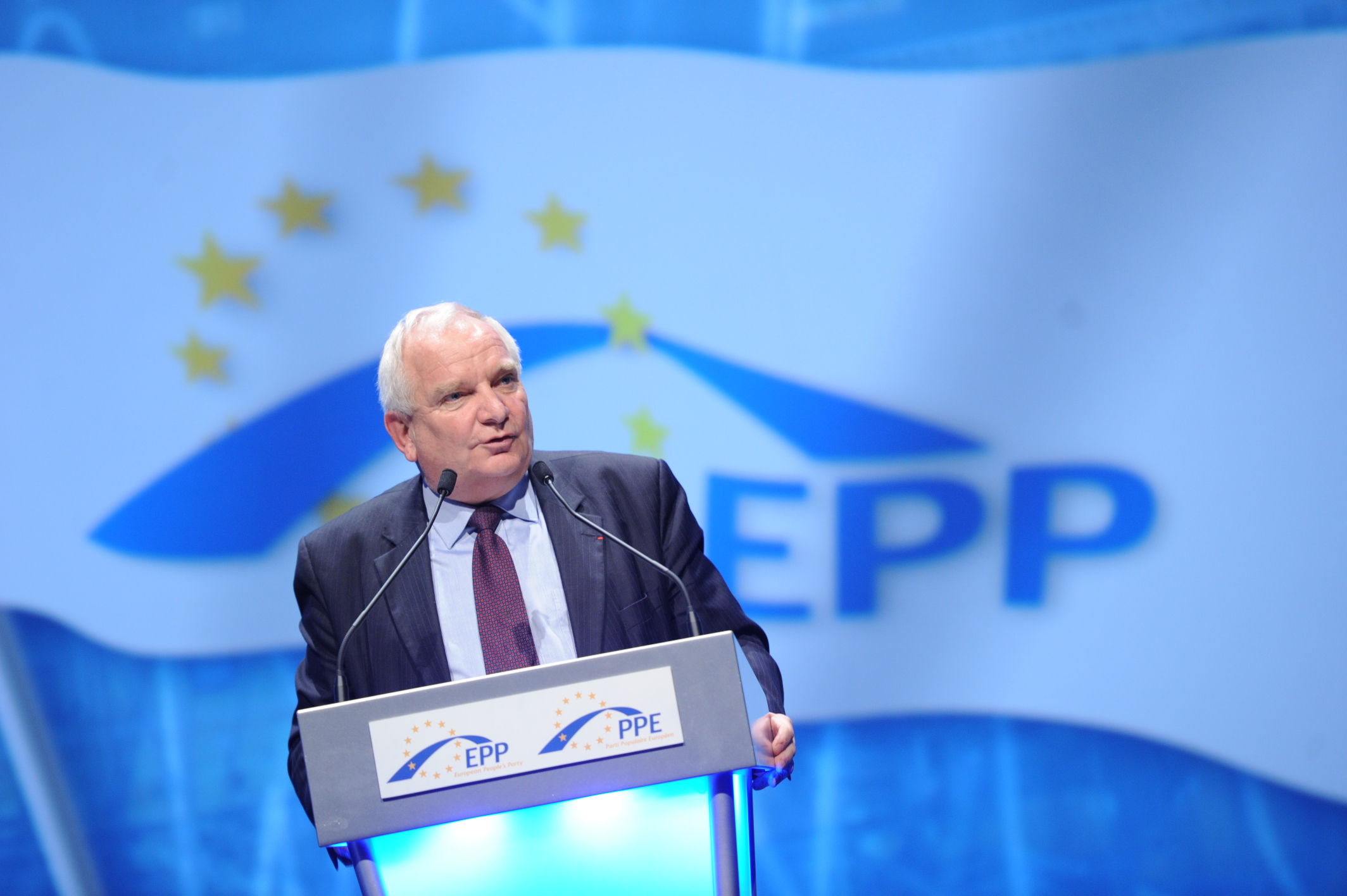 EPP Congress Marseille 6025